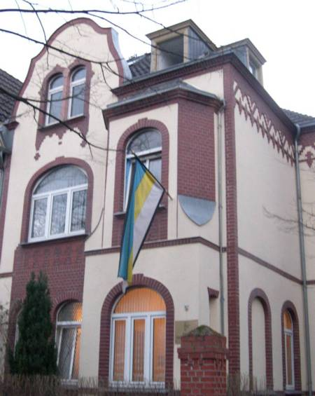 Haus des Corps Silingia Breslau